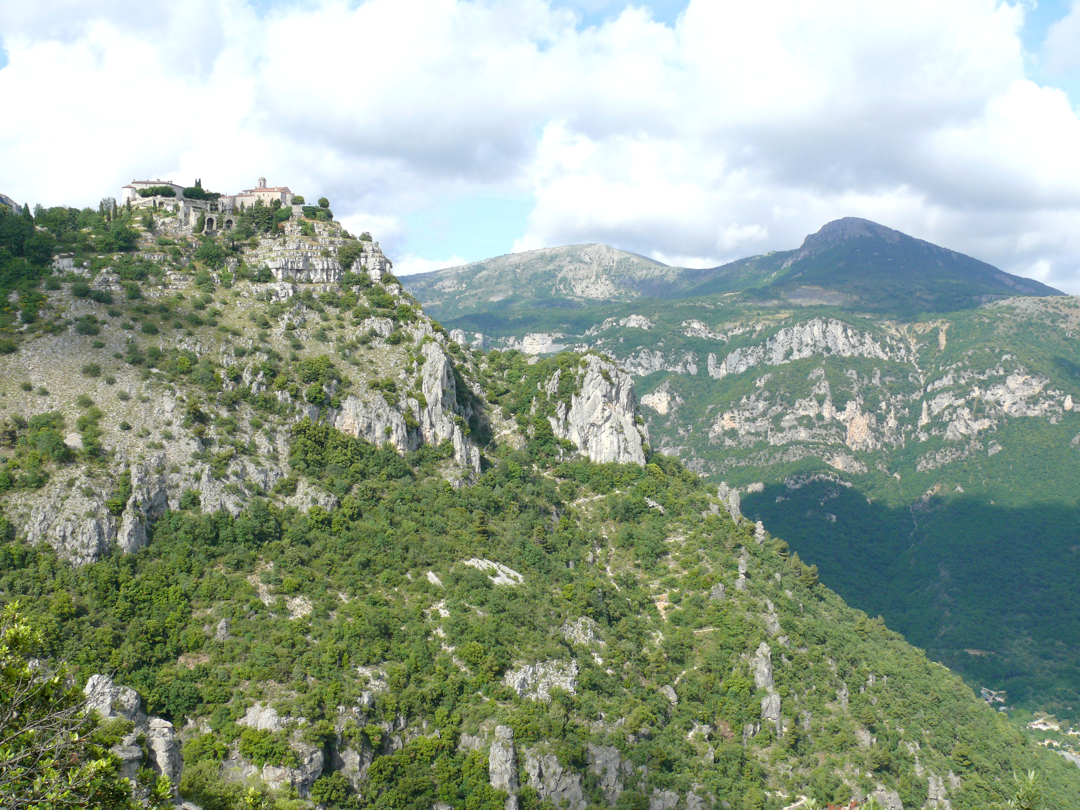 Gourdon - Site du village dominant la vallée du Loup